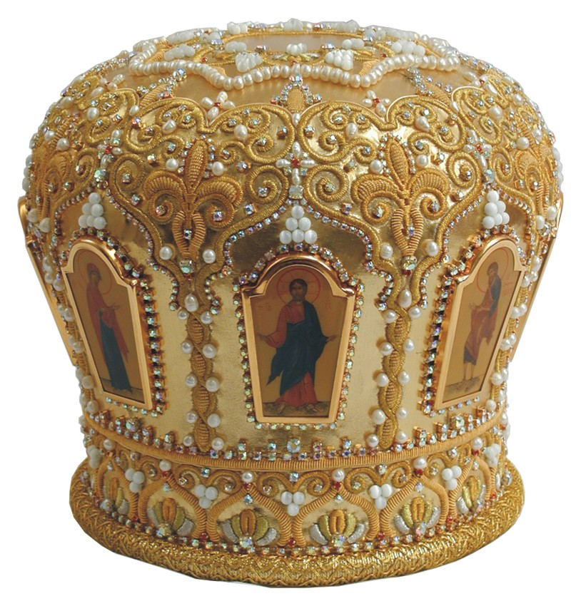 митра архиерейская, жёлтая, с восемью иконами